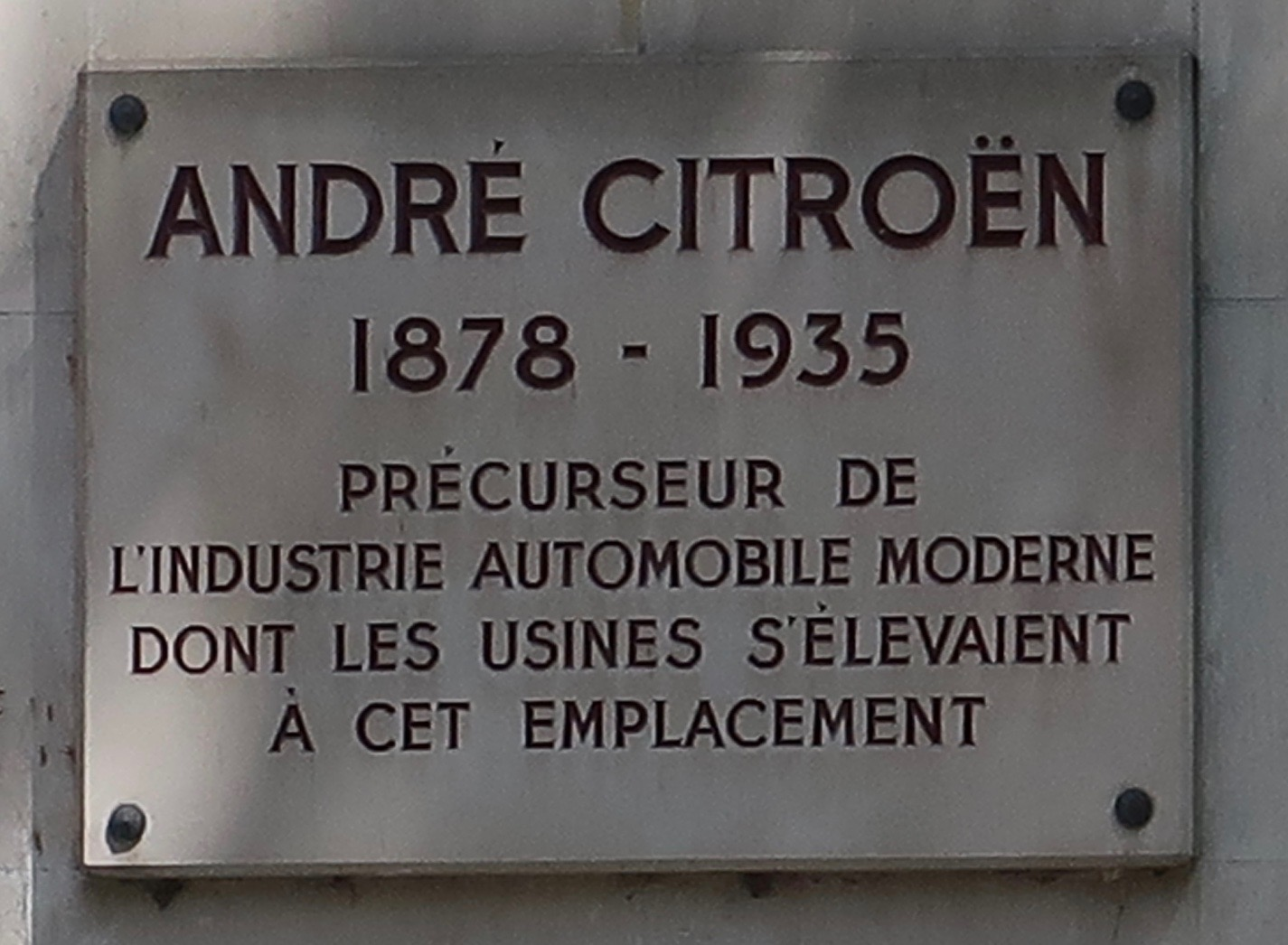 Plaque sur la façade du collège André-Citroën, n° 208 rue Saint-Charles (Paris, 15e).